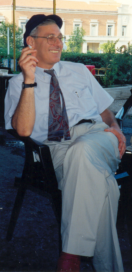 Antonio Pennacchi foto di Aldo Ardetti (msg) 12:57, 7 feb 2009 (CET) If you use my pictures please refer to author